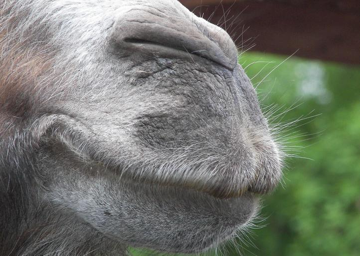 Uśmiech wielbłąda... bezcenne ;)